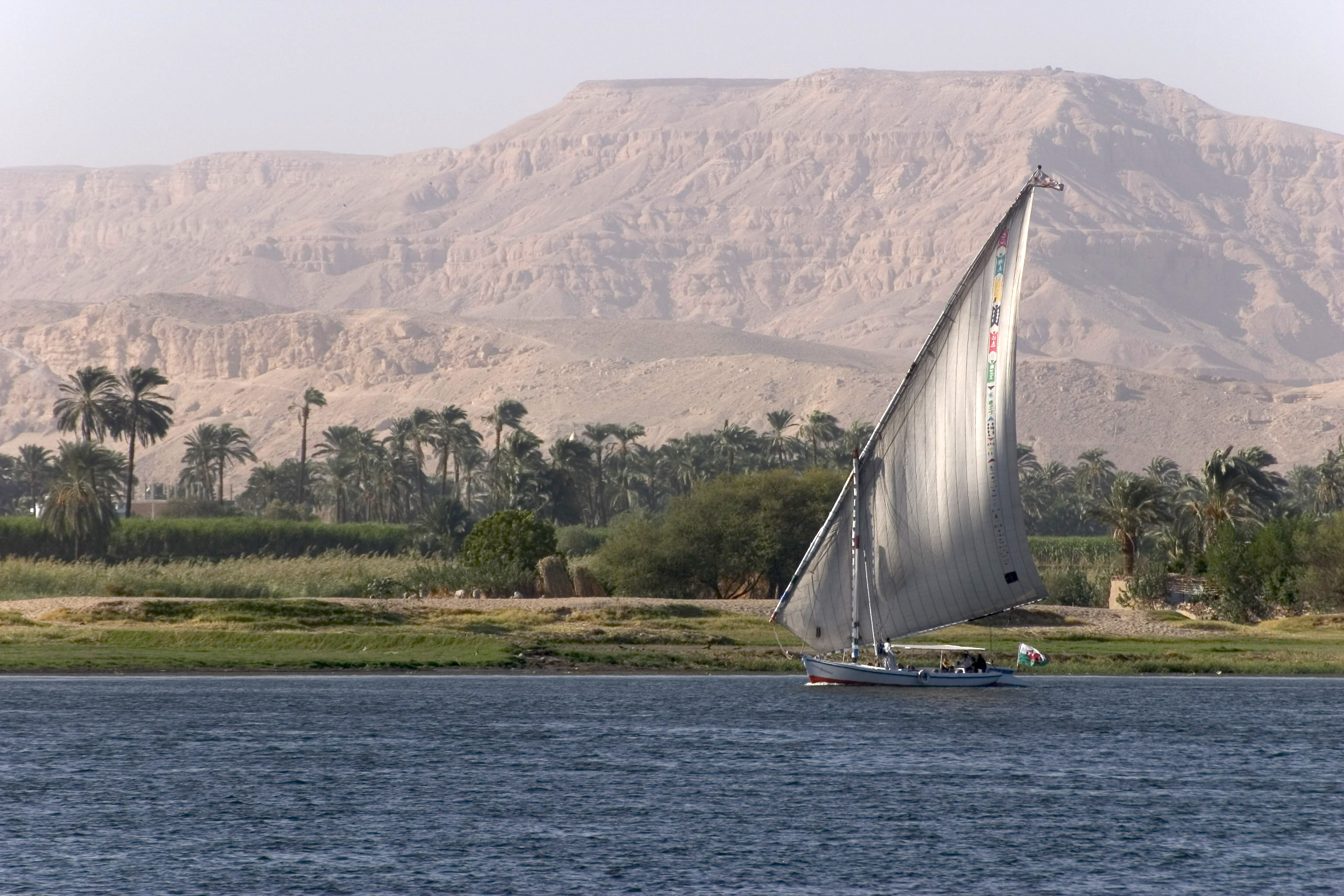 Une félouque sur le nil à Louxor